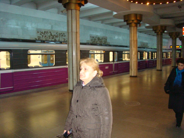 Xalqlar dostluğu metrostansiyasının daxili görünüşü